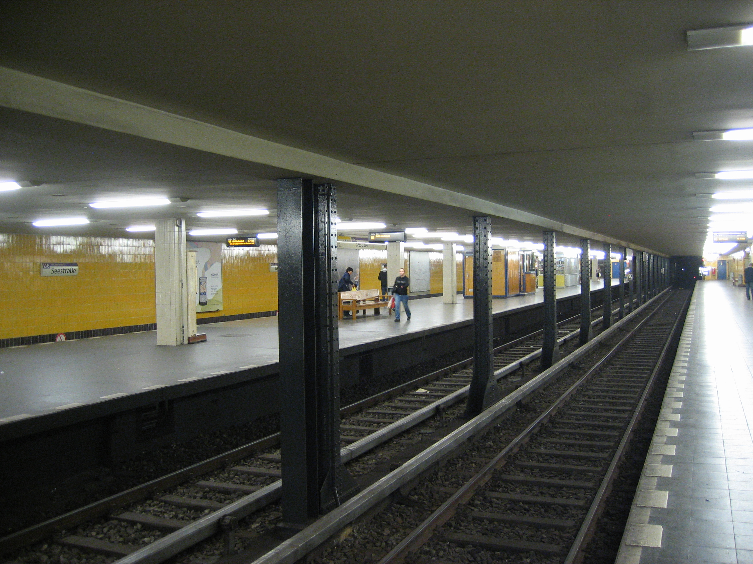 U-Bahnhof Seestraße, Berlin